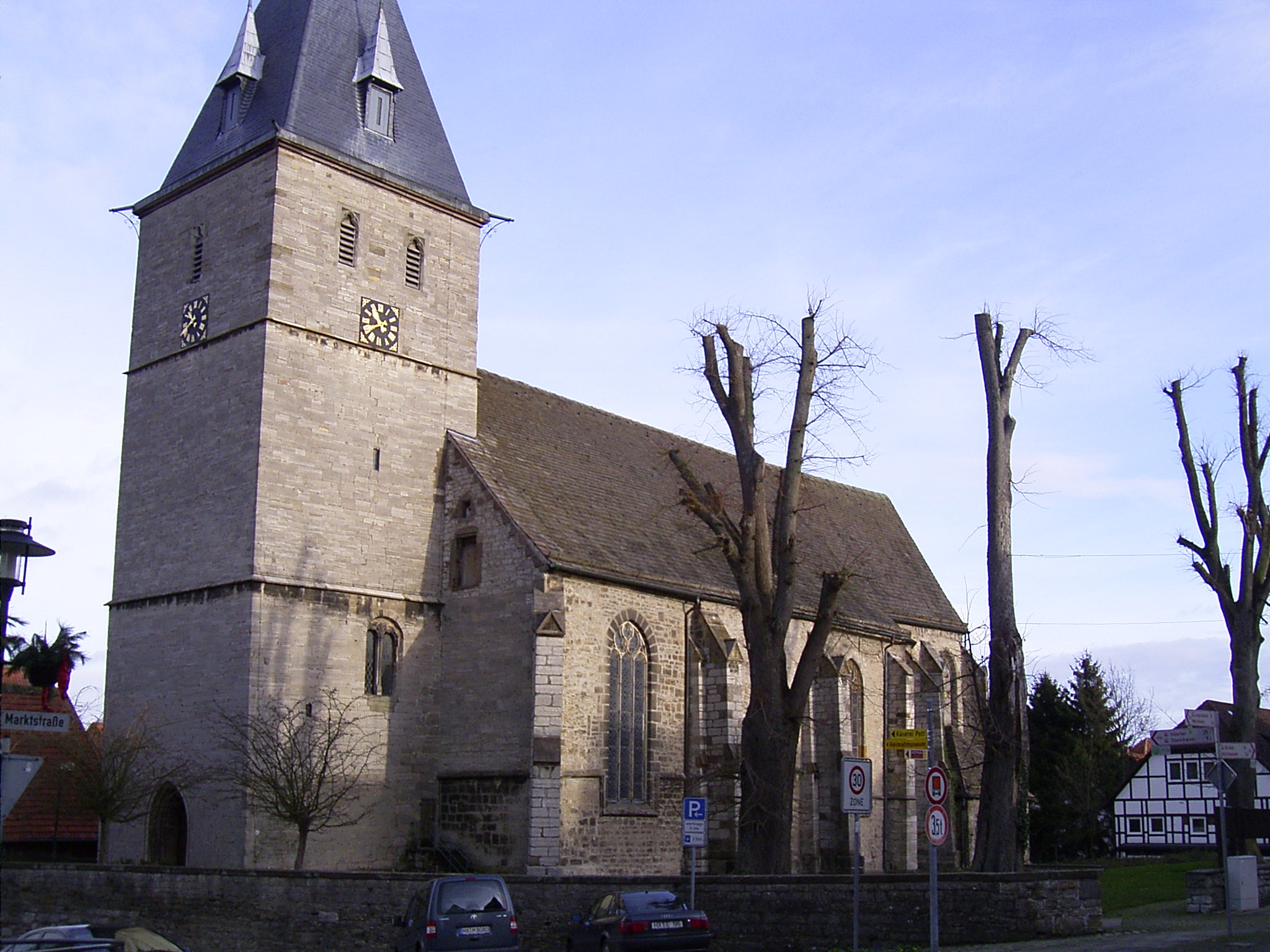 katholische Kirche in Nieheim